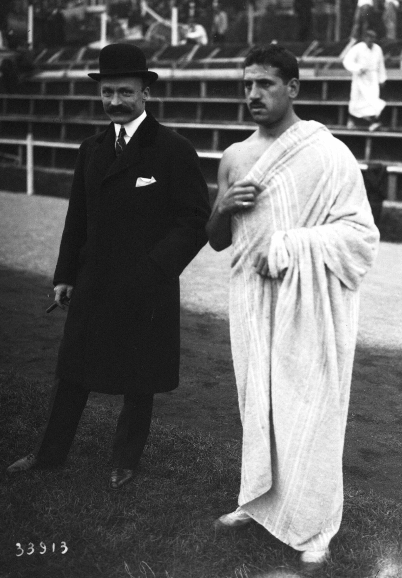 Melchior de Polignac (1880-1950), membre du Comité international olympique, avec l'athlète Jean Bouin (1888-1914) au parc Pommery à Reims en 1913